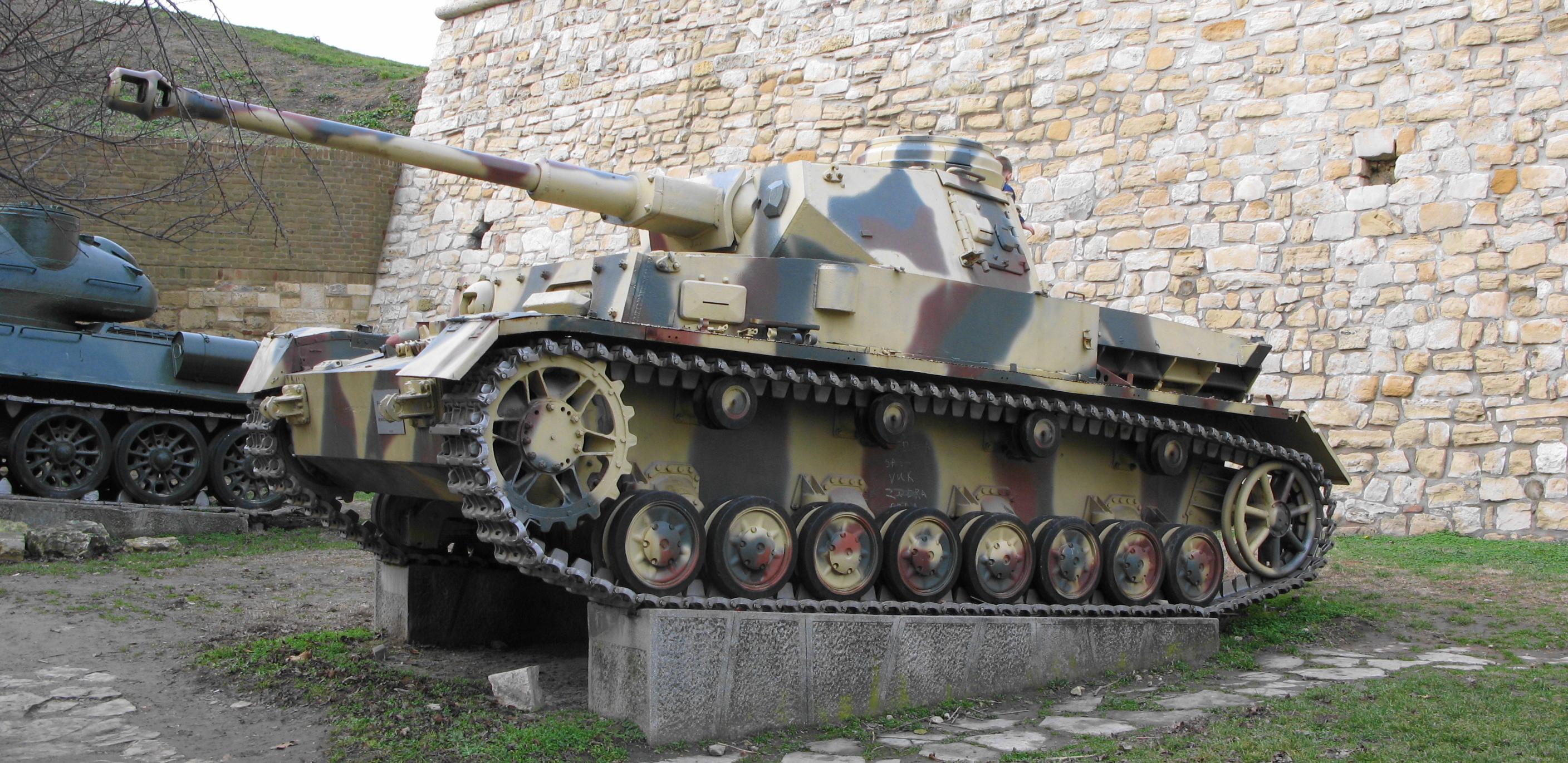 Belgrade military museum (Војни музеј Београд)